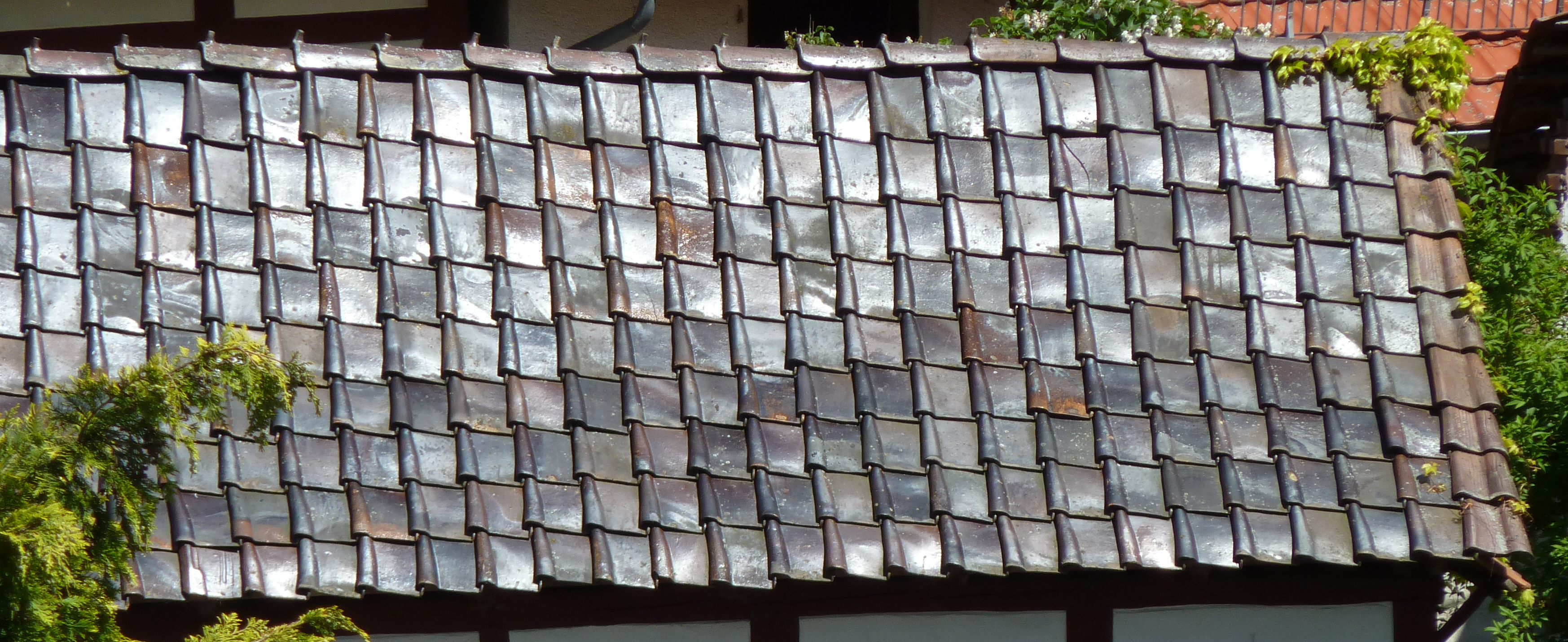 Dachdeckung eines Nebengebäudes in Hilgershausen mit glasierten handgeformten Krempziegeln (Linkskrempern)